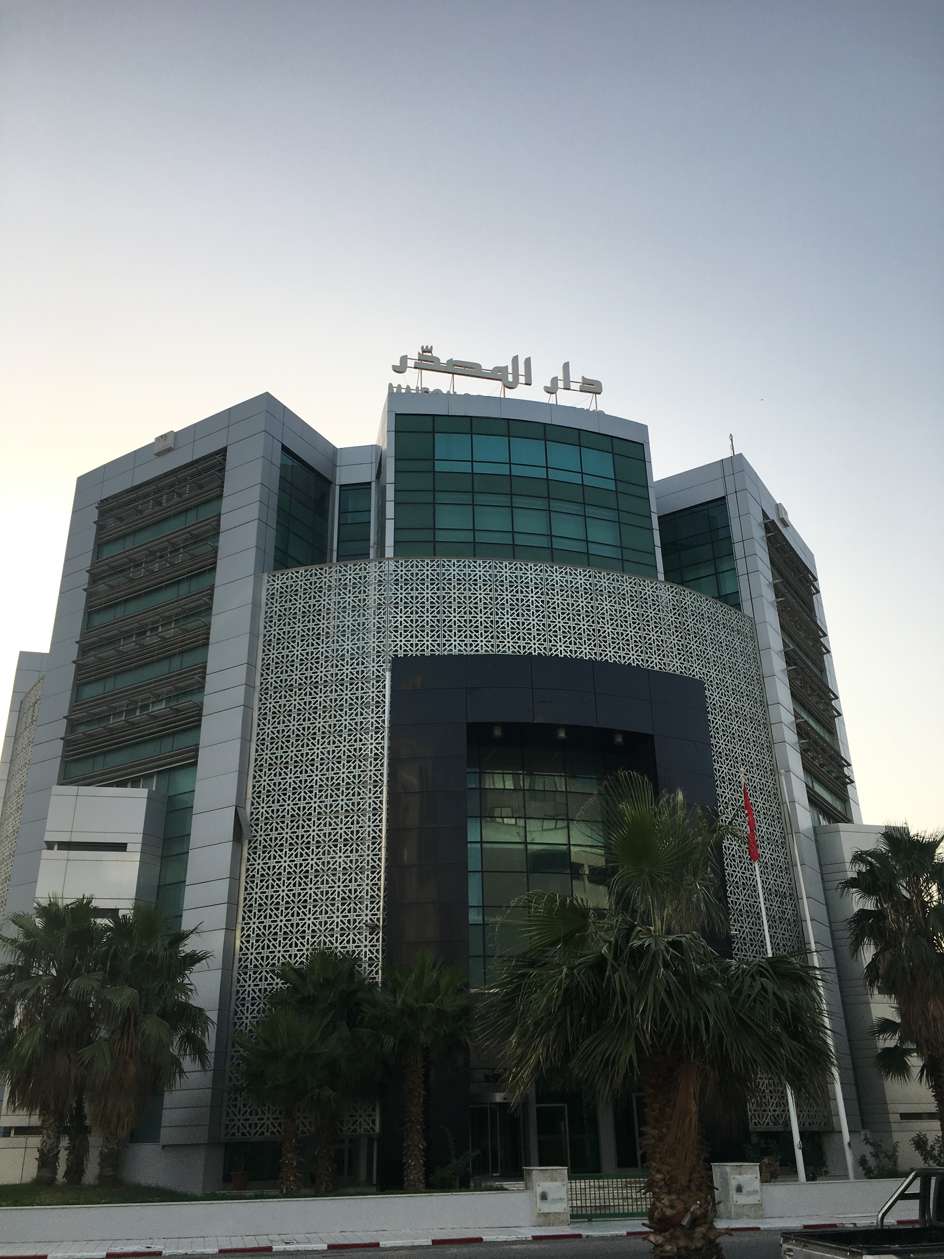 Maison de l'Exportateur (Centre Urbain Nord, Tunis), 2019.